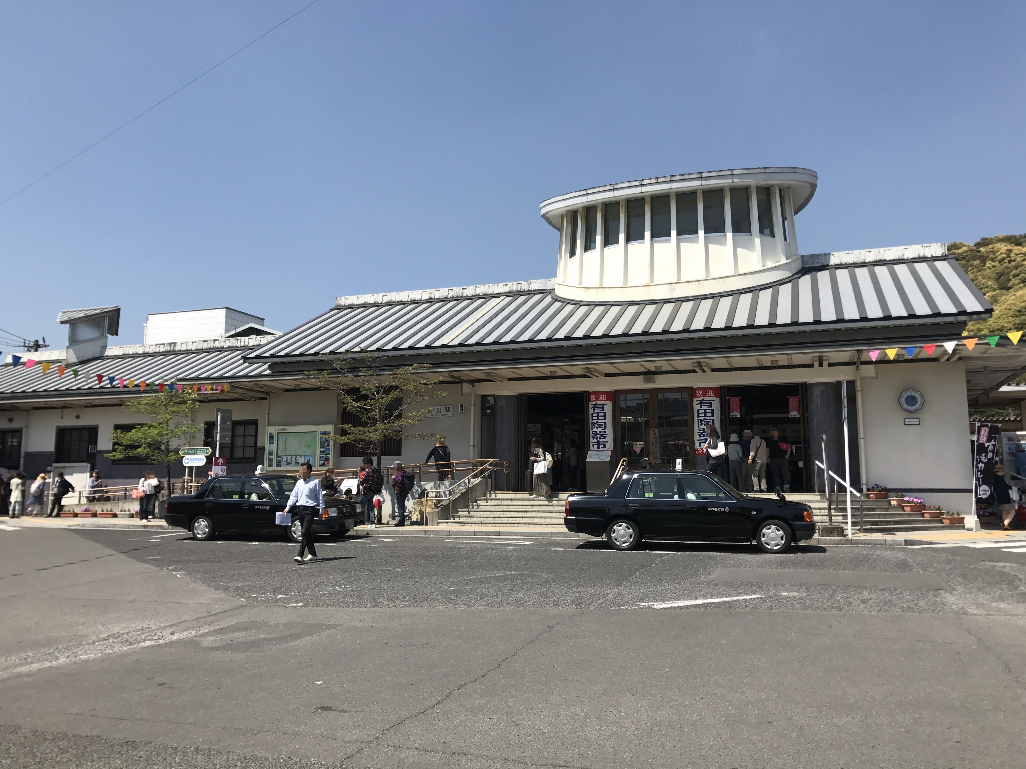 有田駅駅舎